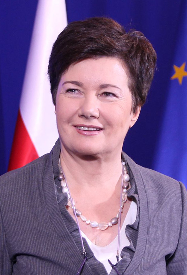 Konferencja "Zapytaj Platformę"